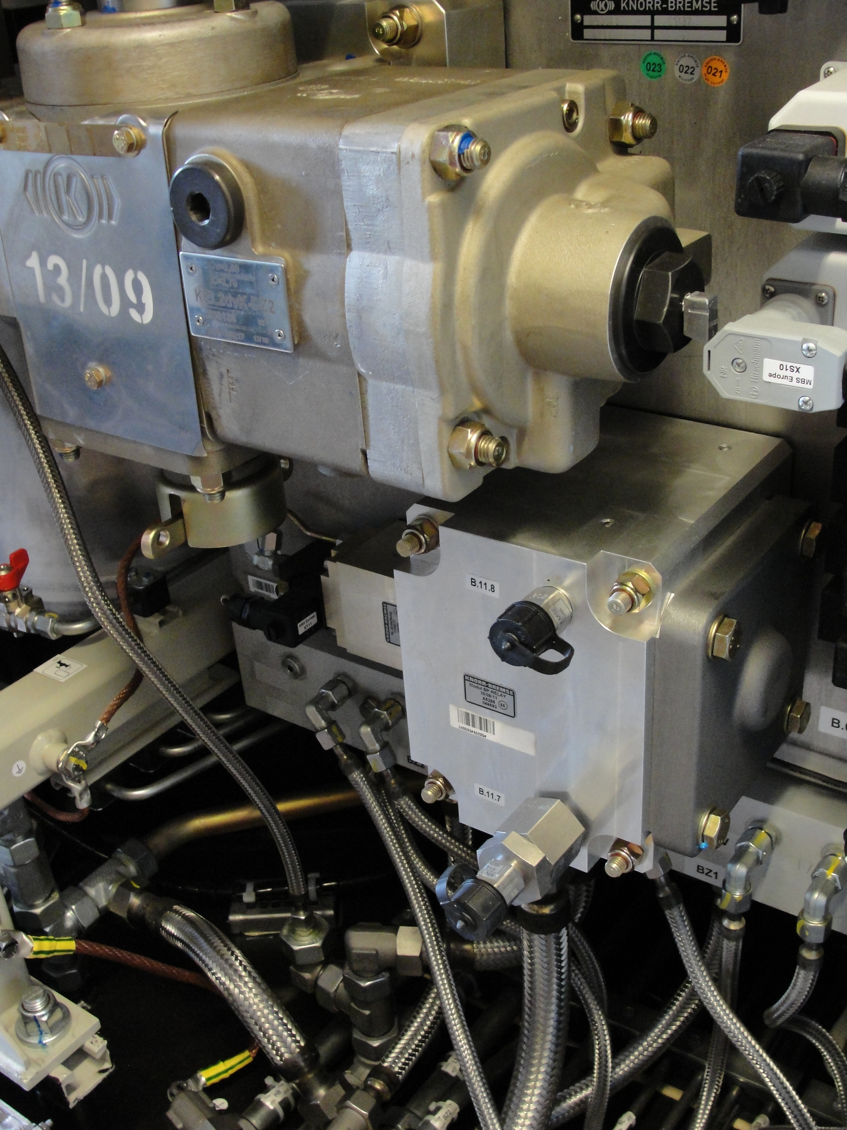 Aperçu du compartiment pneumatique d'une locomotive électrique moderne (Bombardier Traxx E 186) - appareillages de frein siglés Knorr-Bremse ("K").